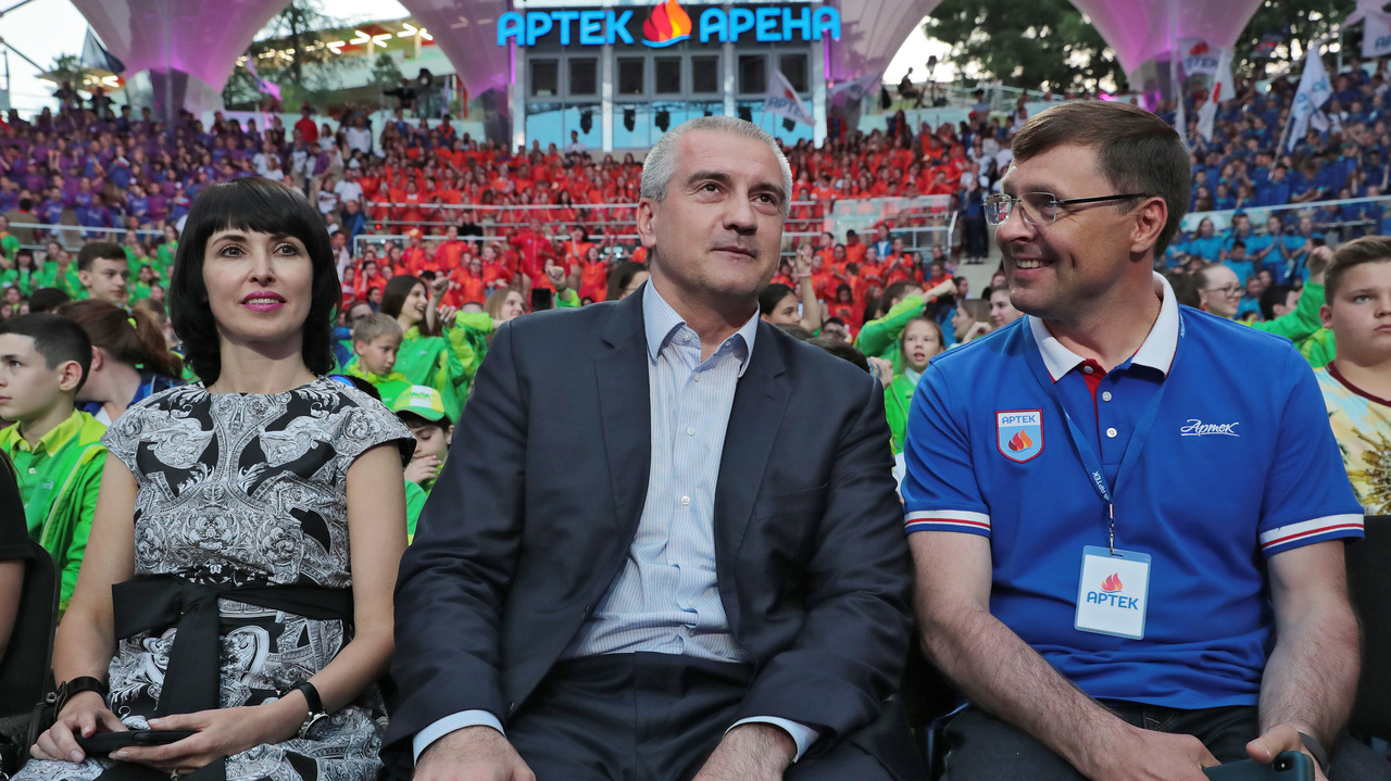 Глава Республики Крым Сергей Аксёнов принял участие в церемонии открытия финала 12-го Международного конкурса молодых исполнителей популярной музыки «Детская новая волна - 2019», который проходит в МДЦ «Артек».